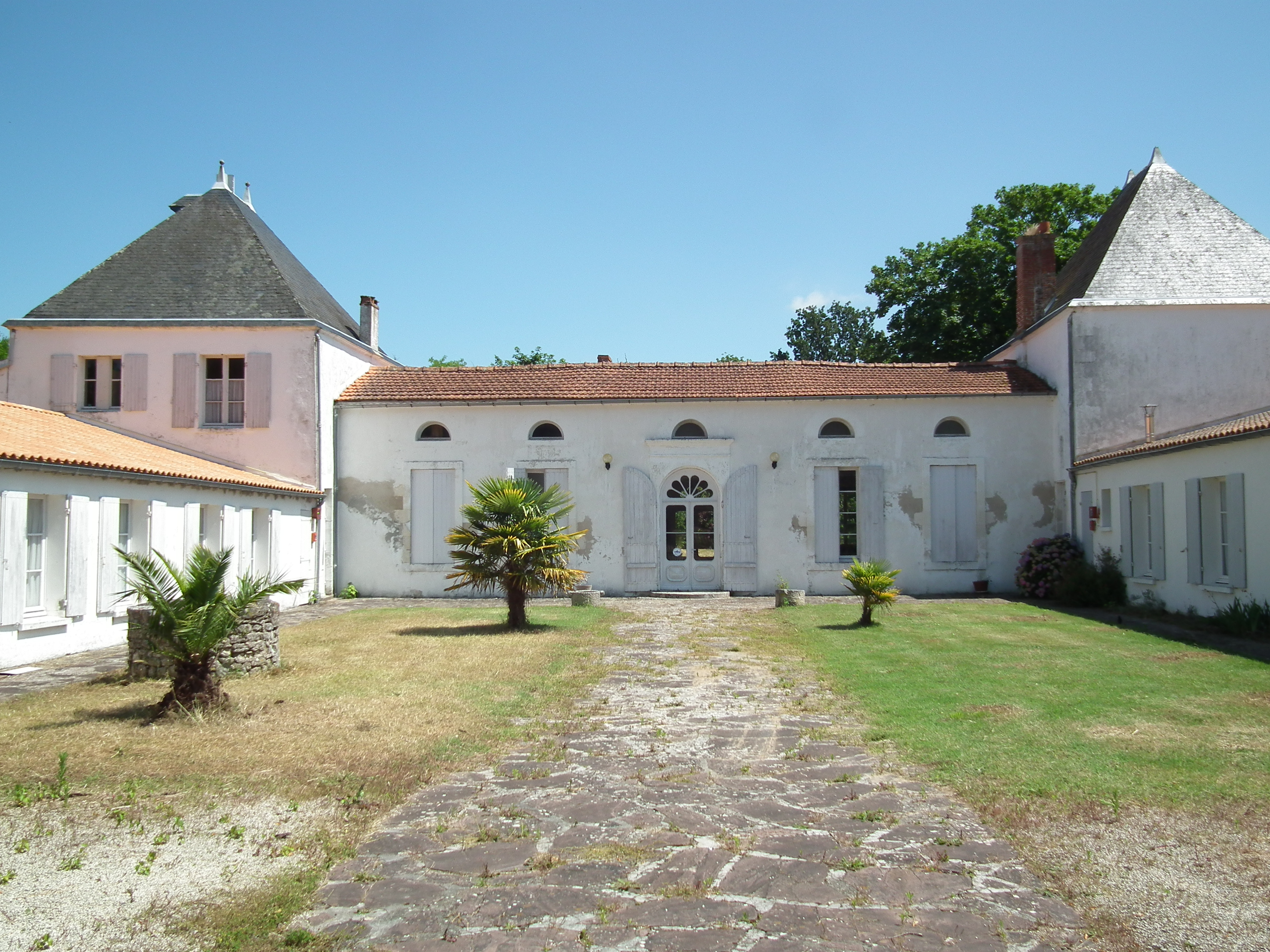 Logis de La Granderie à Etaules